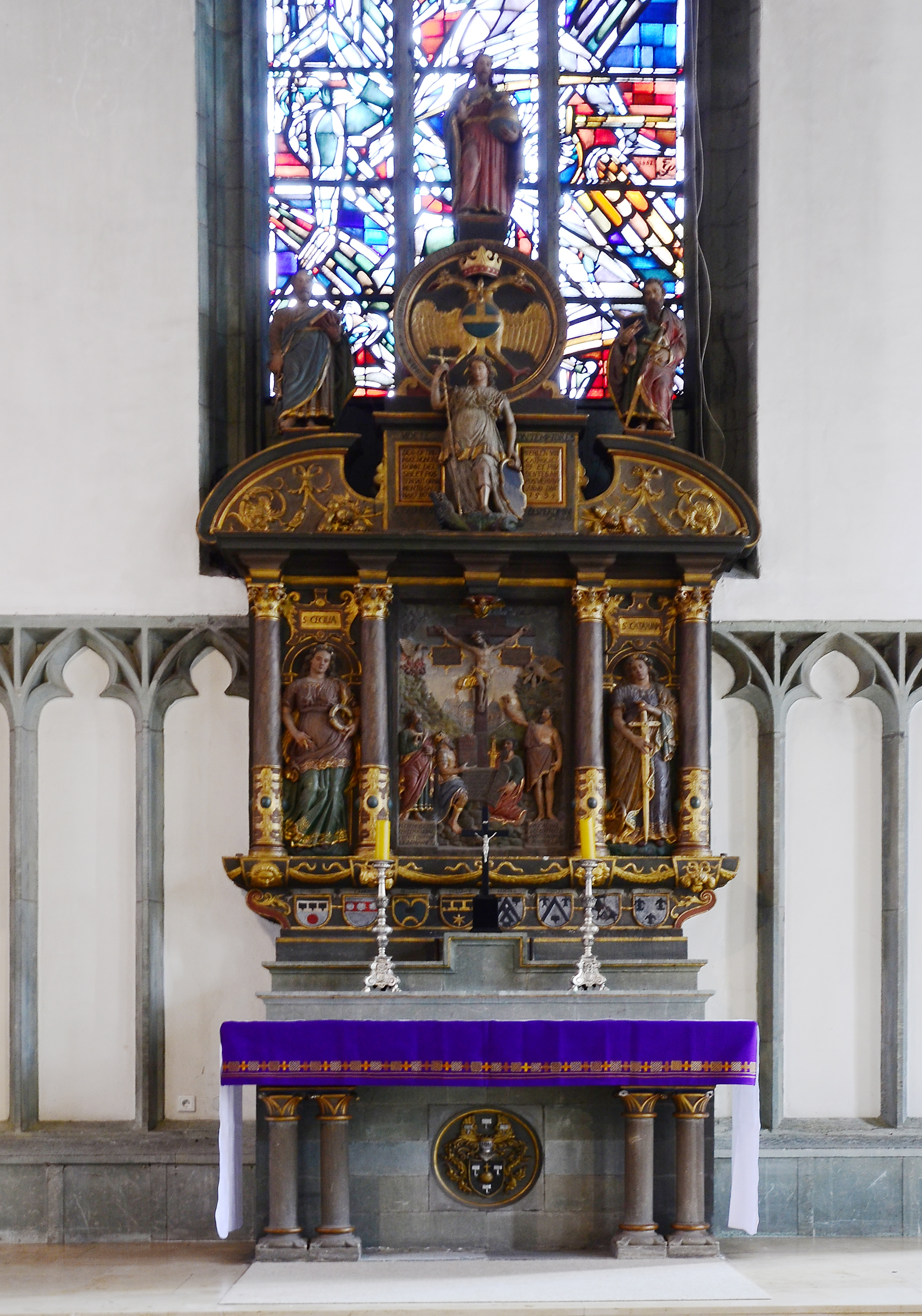 denkmalgeschützte Propsteikirche, Erbsälzeraltar